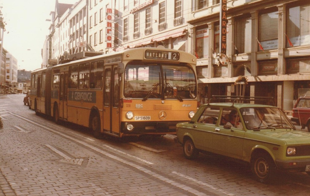 Trolleybus 328 in Bergen (Norwegen)